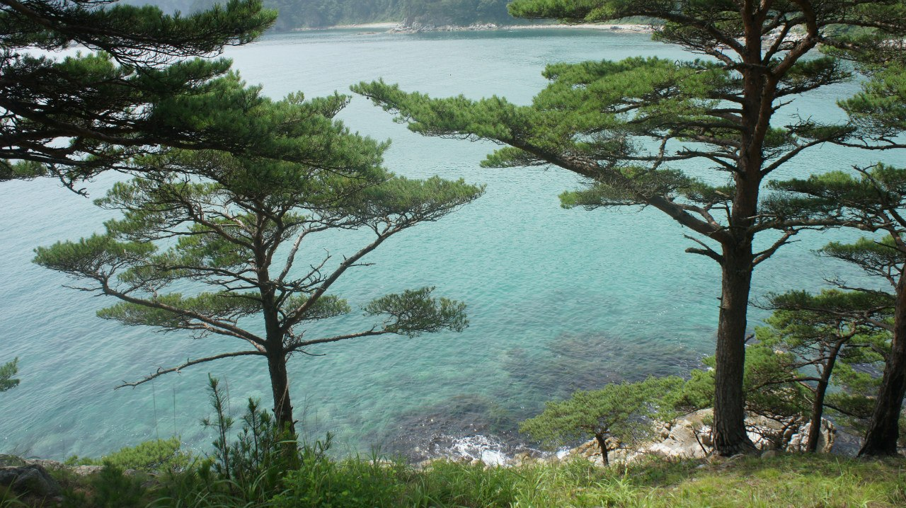 Дальневосточный морской: Заповедник занимает часть акватории залива Петра Великого Японского моря, 12 небольших островов, а также участок материкового побережья и расположен на территории Приморского края,Владивостокский городской округ, Приморский край This image is related to the protected area of Russia number 2500025